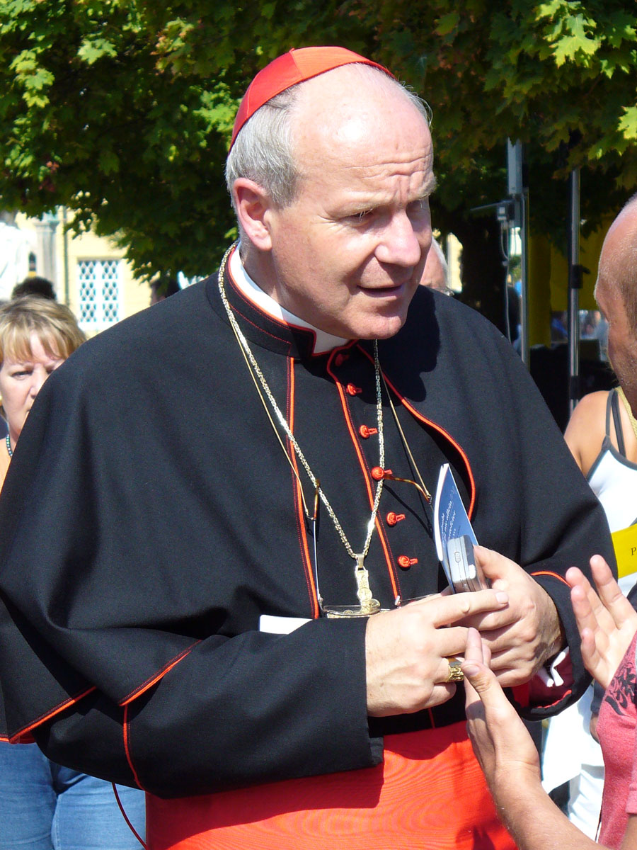 Christoph Kardinal Schönborn am Tage des Besuches von Papst Benedikt XVI. auf dem Kapellplatz im Marienwallfahrtsort Altötting im Gespräch mit Pilgern